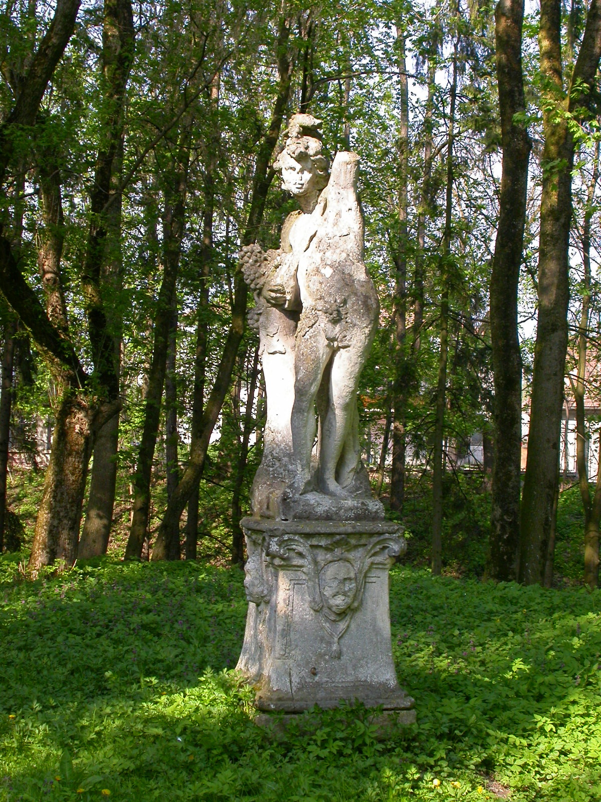 Ansamblul castelului Teleki, sec. XVIII - XIX